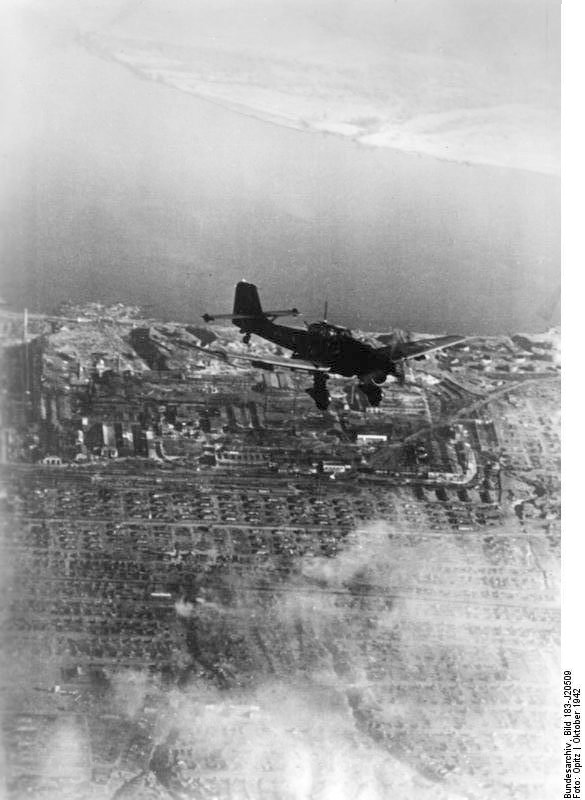 Russland, Kampf um Stalingrad, Luftangriff Scherl: An der Sowjetfront: Im Kampfflugzeug über Stalingrad.- In der Stadt sind schon die ersten neuen Brandherde sichtbar. PK-Aufnahme: Kriegsberichte Opitz (sch) 5703-42 "Fr.Fr.OKW" Oktober 1942 [Herausgabedatum] ADN-Bildarchiv: II. Weltkrieg 1939-45 An der Front in der Sowjetunion; Oktober 1942 Sturzkampfflugzeuge "Ju 87" der deutschen Luftwaffe fliegen wiederum Angriffe auf Stalingrad; schon sind neue Brandherde sichtbar. [Sowjetunion.- Schlacht um Stalingrad.- Luftangriff mit Flugzeug Junkers Ju 87 "Stuka"]